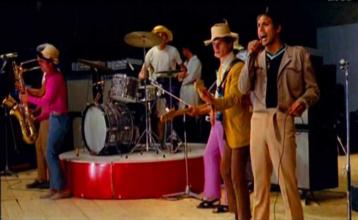 Cantagiro 1967